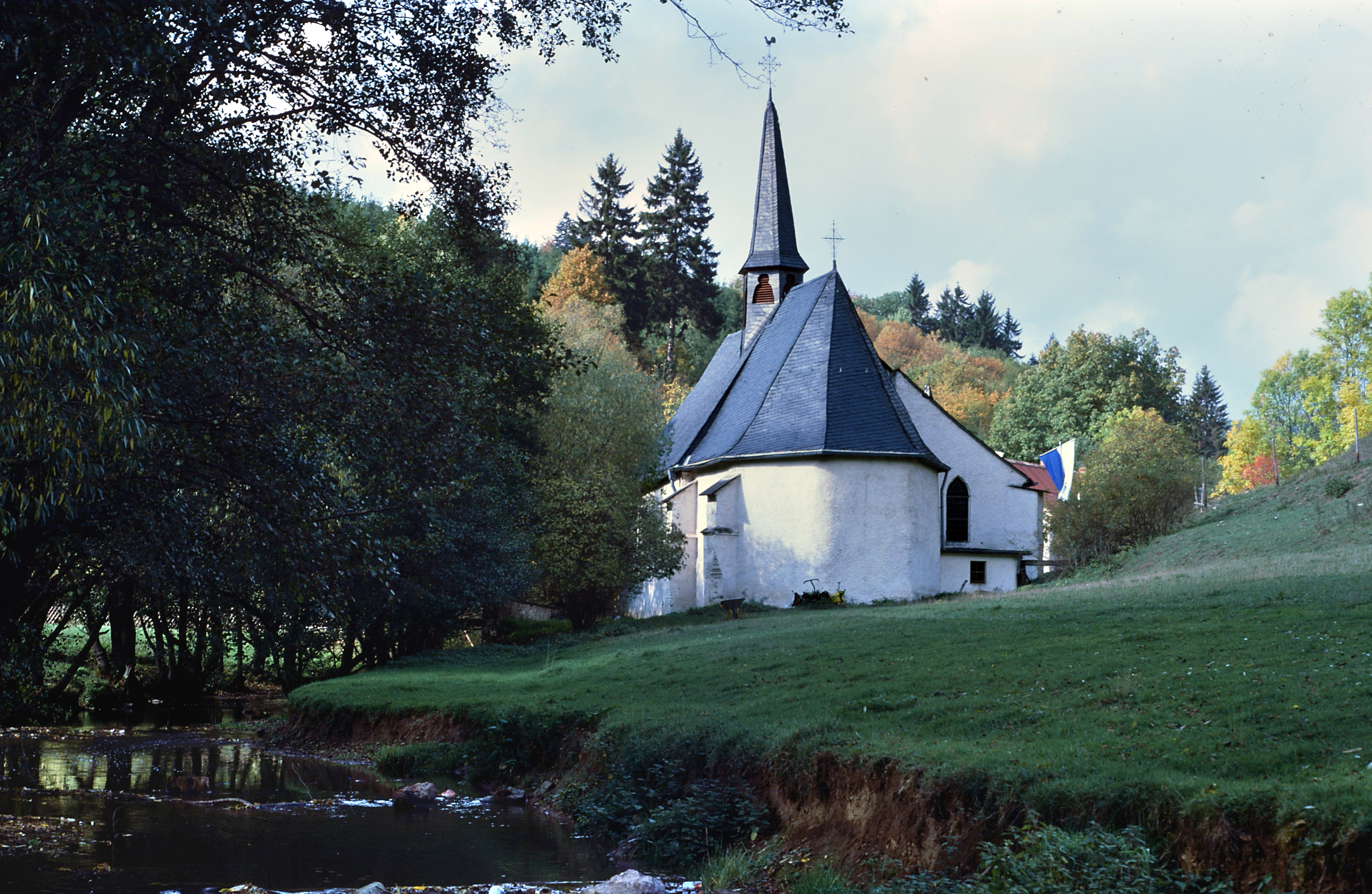 Wallfahrtskapelle St. Jost bei Langenfeld in der Eifel, Blick von Südosten